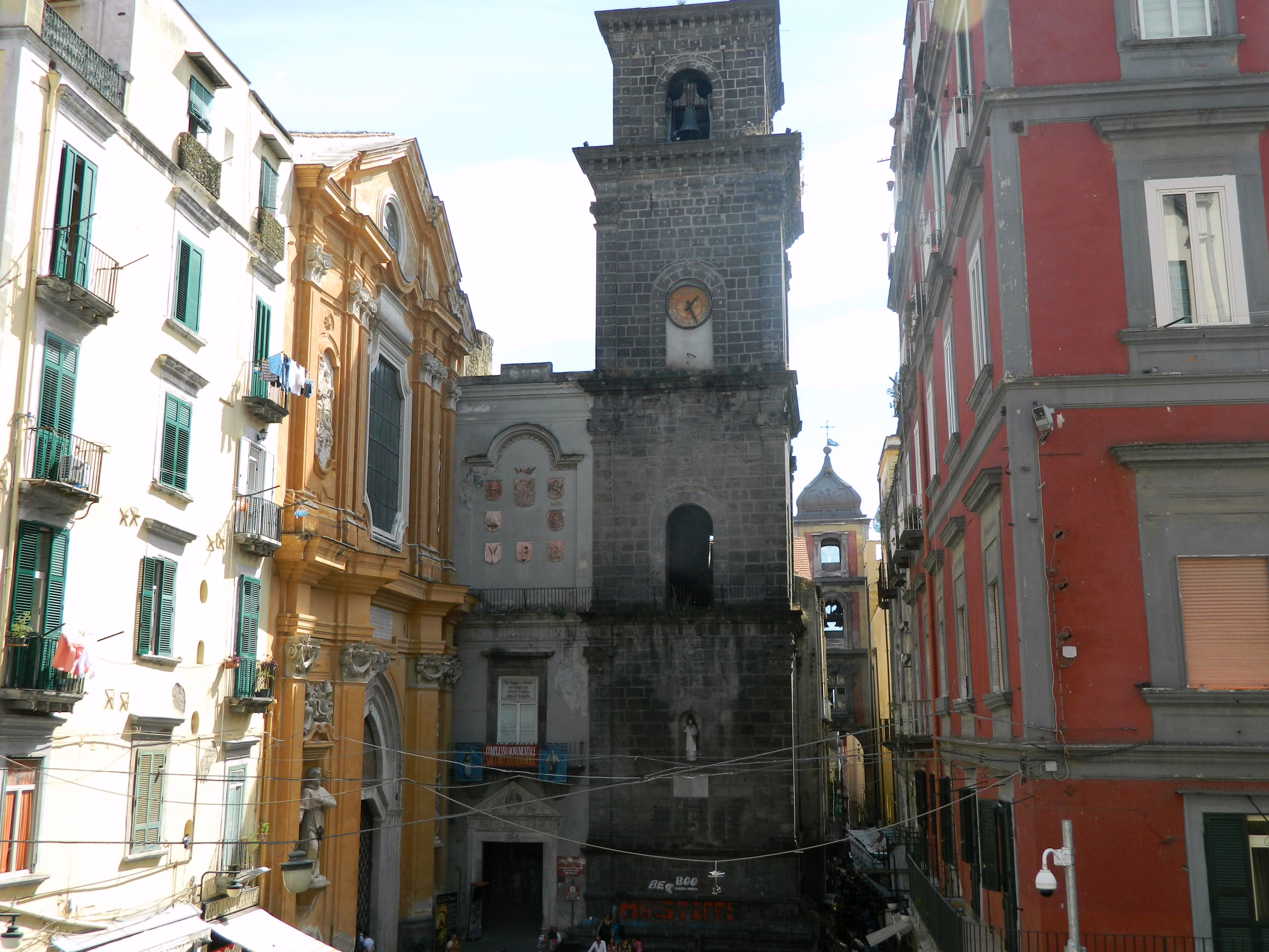 Facciata della Basilica di San Lorenzo Maggiore (Napoli).